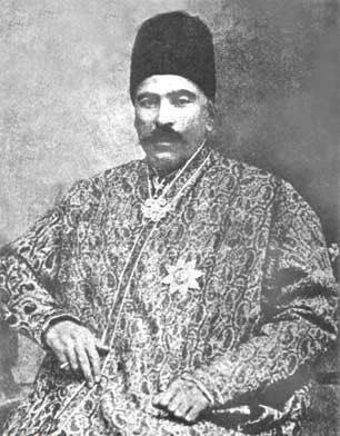 جمشید جمشیدیان در زمان دریافت نشان از شاه